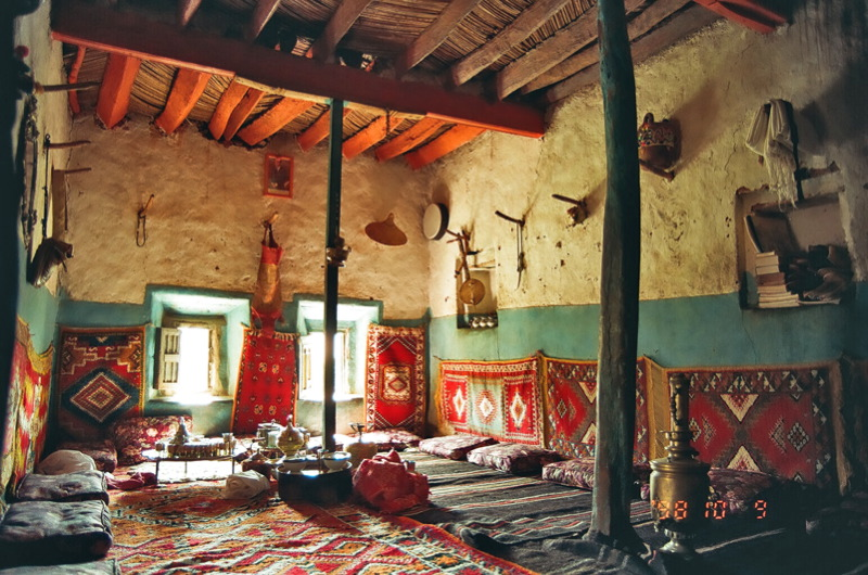 Intérieur d'une maison berbère marocaine (Région de Marrakech, Maroc).